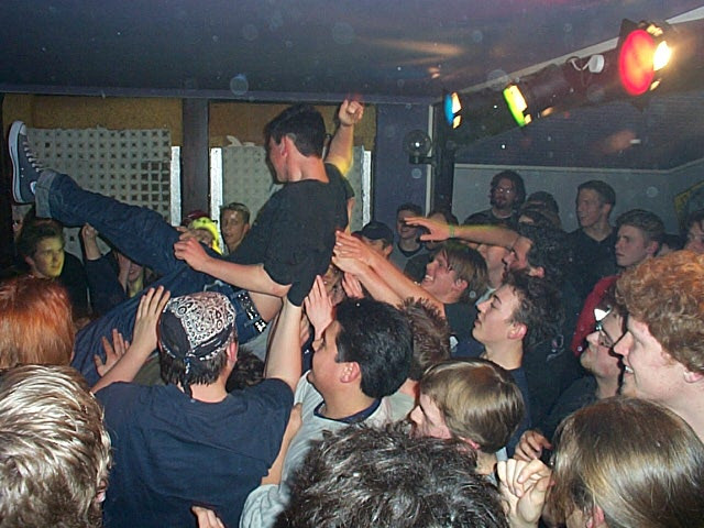 Crowdsurfer bei einem Konzert von ashtray am 14.03.2003 im Café Amerika in Horb-Mühringen